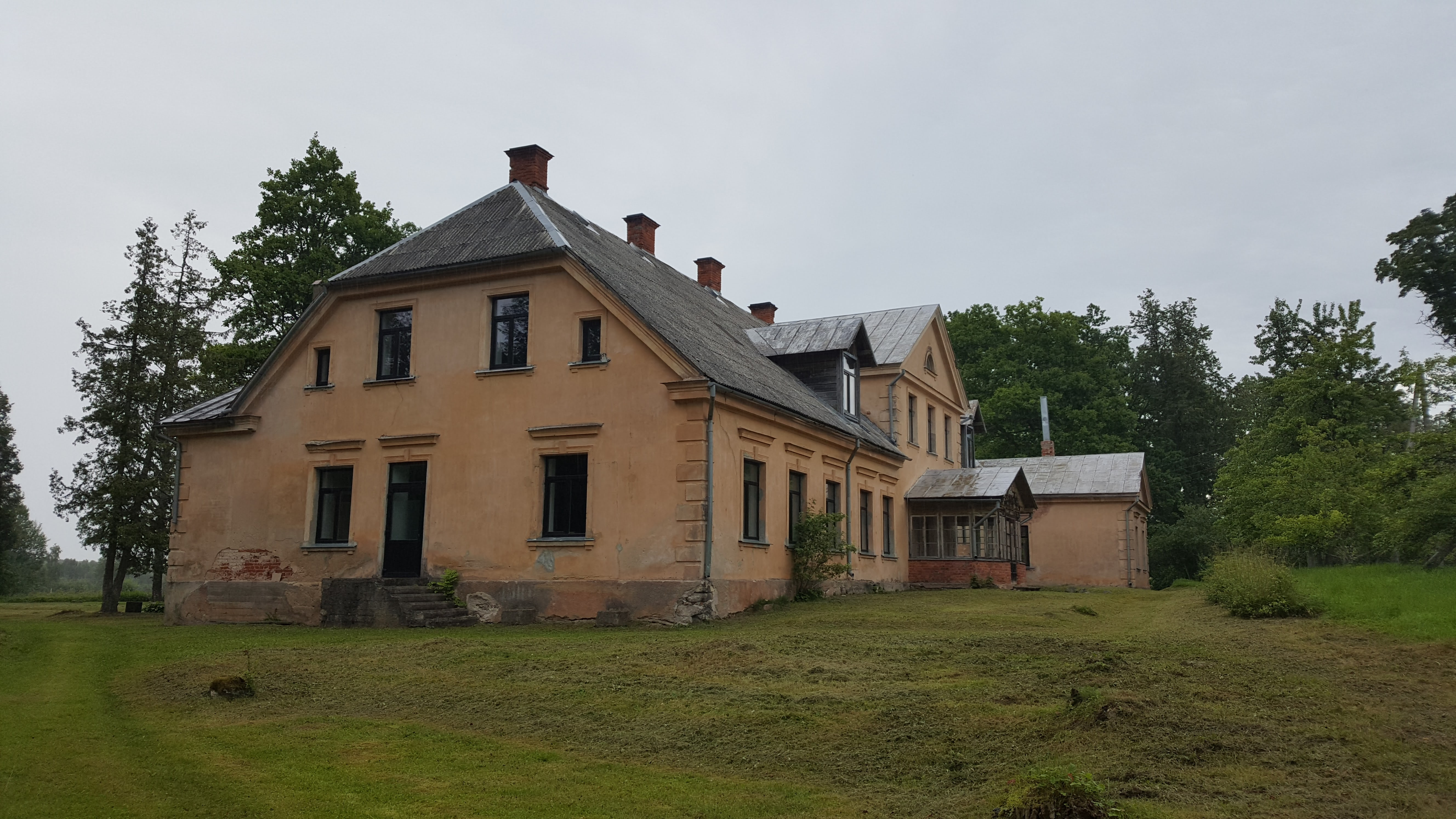 Branti mõisa peahoone 2017. aastal.